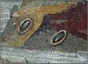 Deux mollusques sur un autre rocher, détail